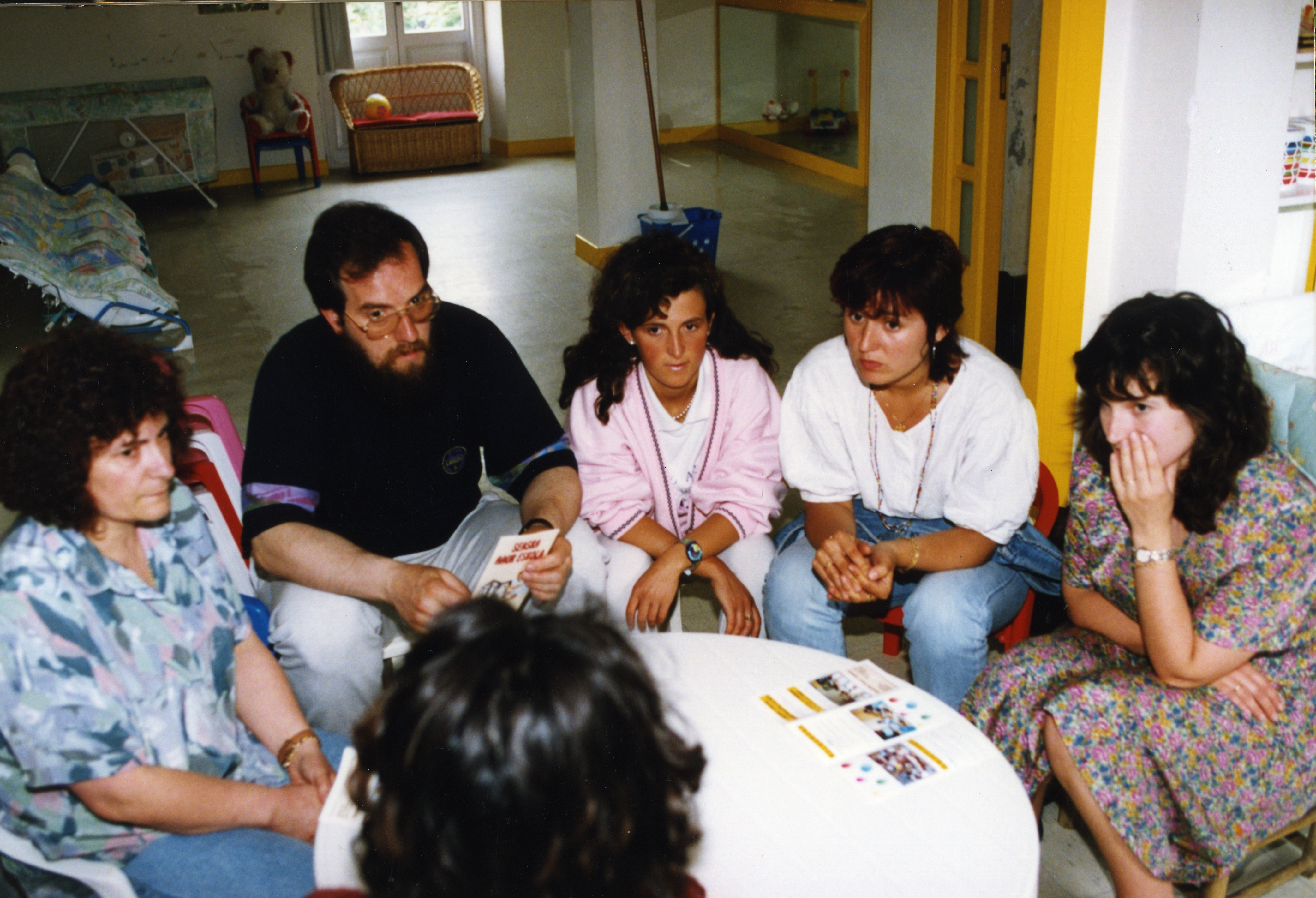 Guraso eta hezitzaile batzuk. Aiurri 3 zbk. 9. orr.